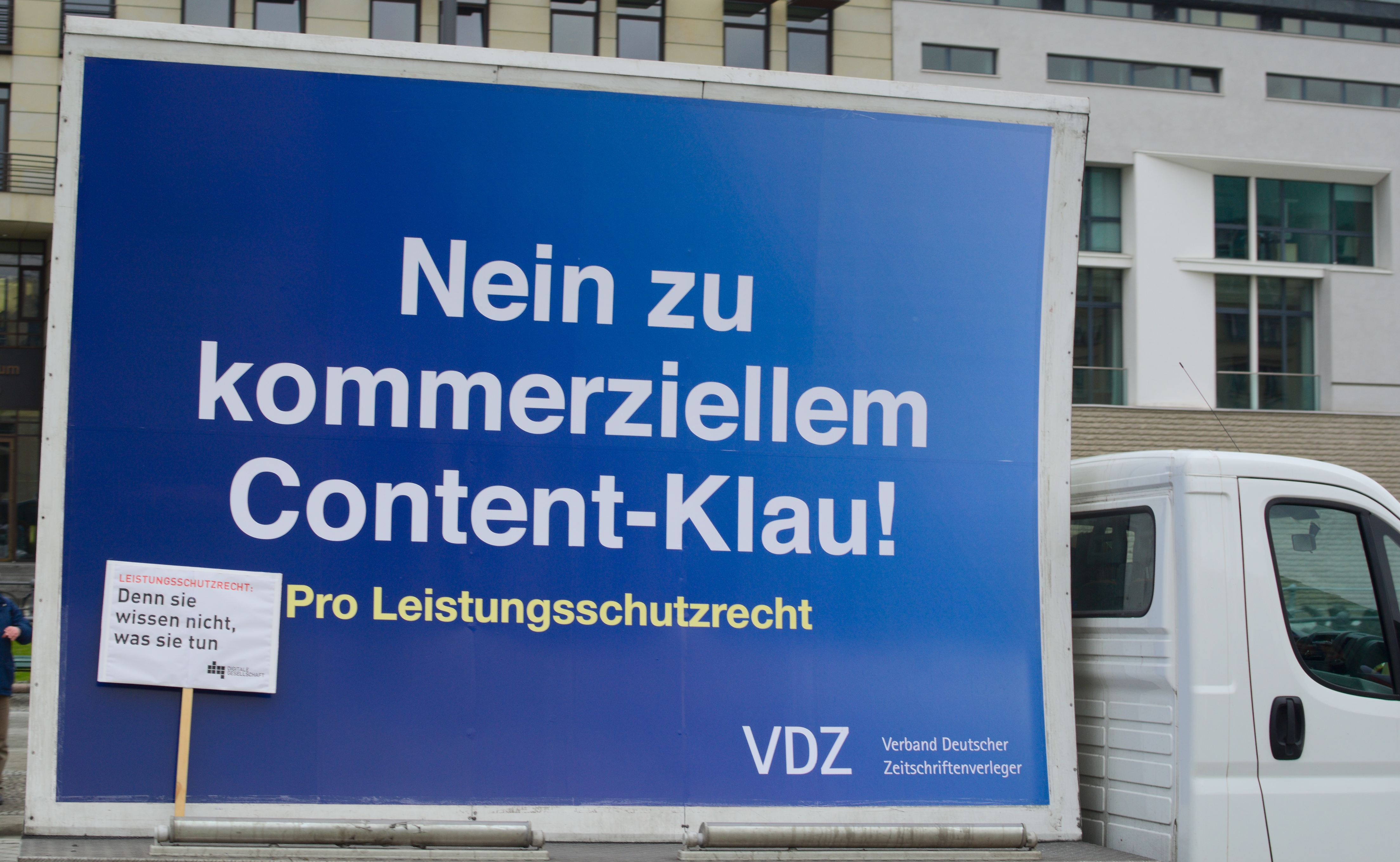 Plakat des VDZ. Abmahnwache Leistungsschutzrecht 01.03.2013